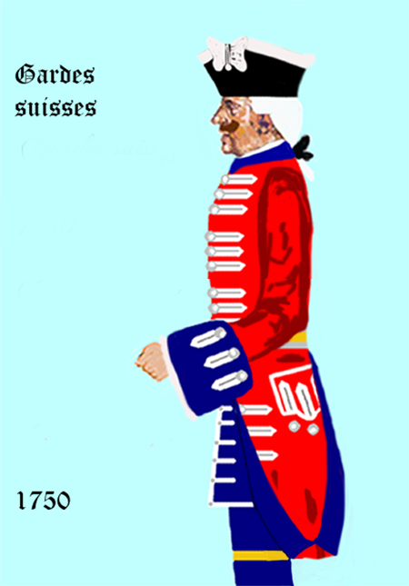 Schweizergarde Gardist um 1750